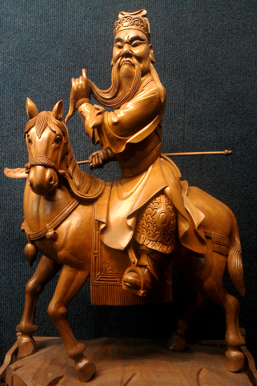 黃龜理「關聖帝君」木雕,新北市板橋區第二區忠翠里